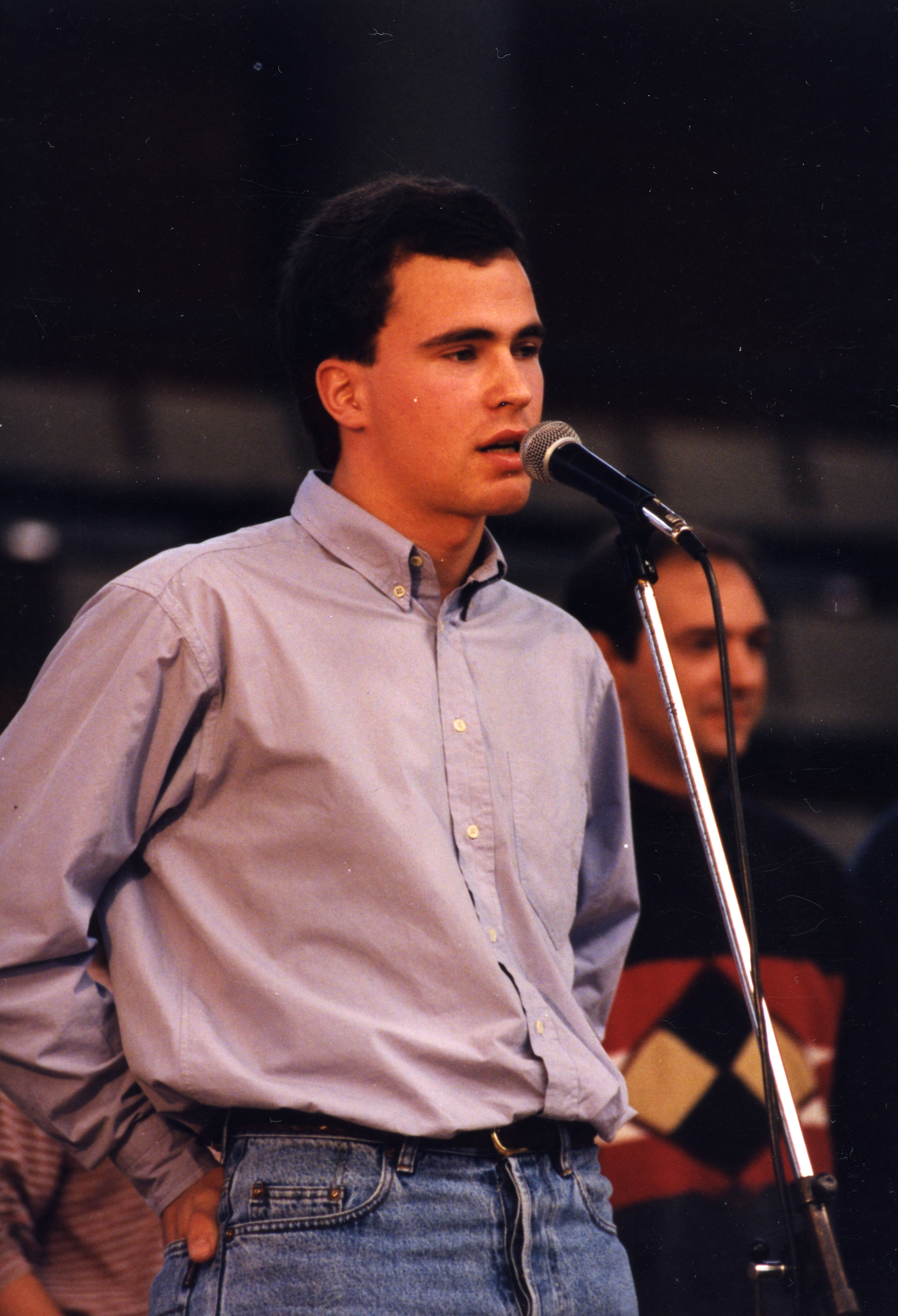 Aitor Mendiluze. Aiurri 11 zbk. 5. orr.